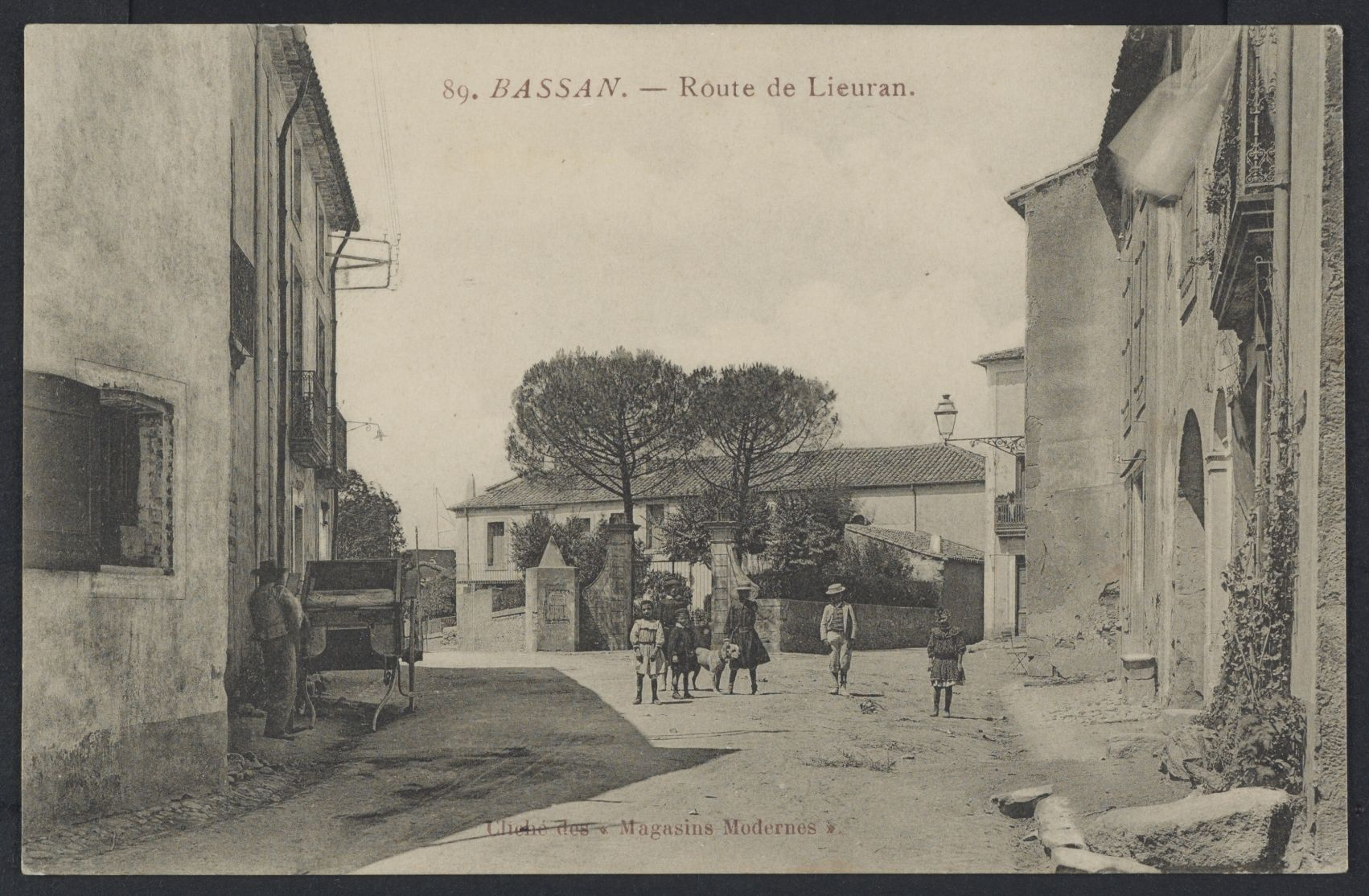 Bassan. - Route de Lieuran : carte postale.